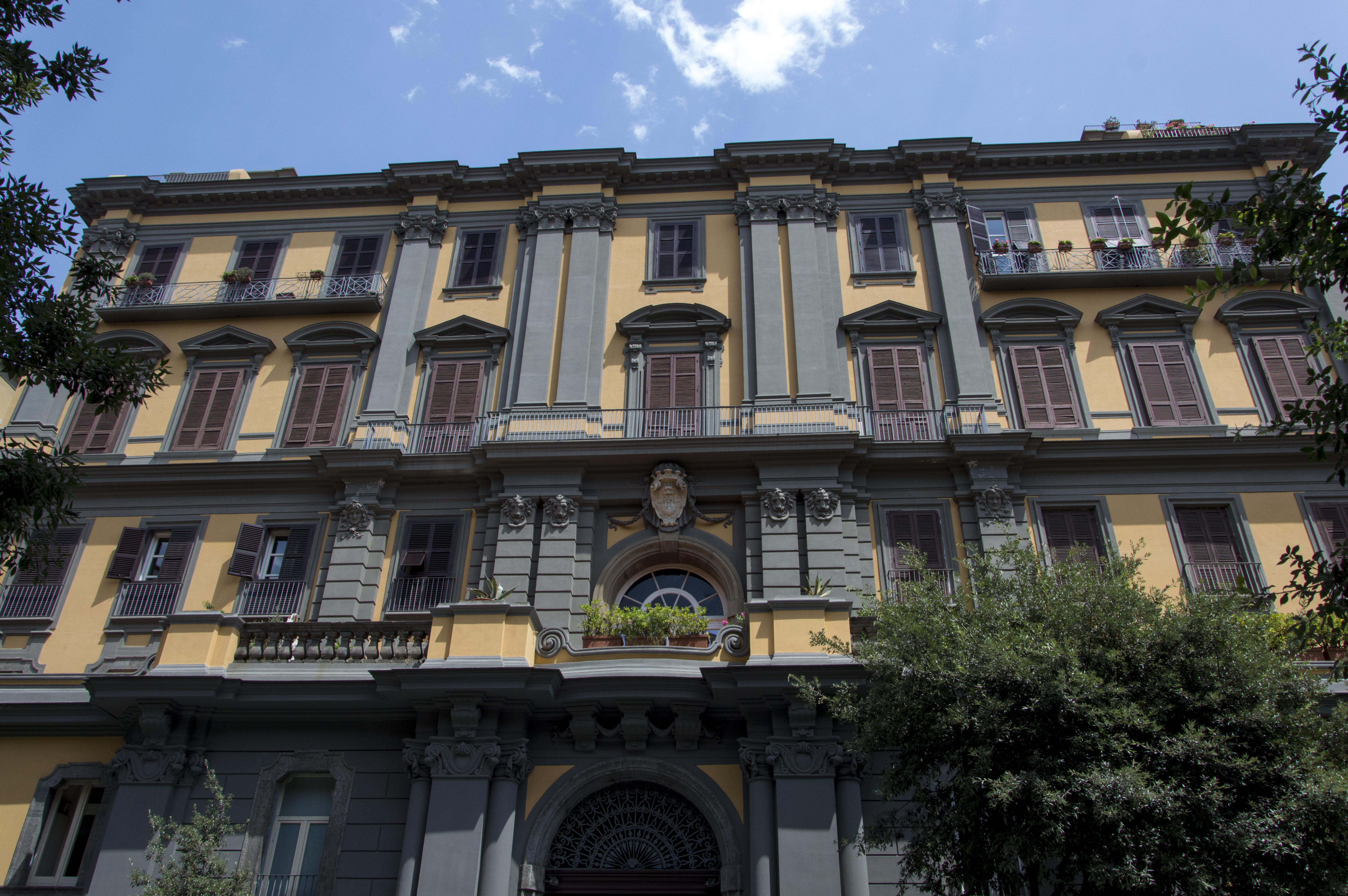 Facciata